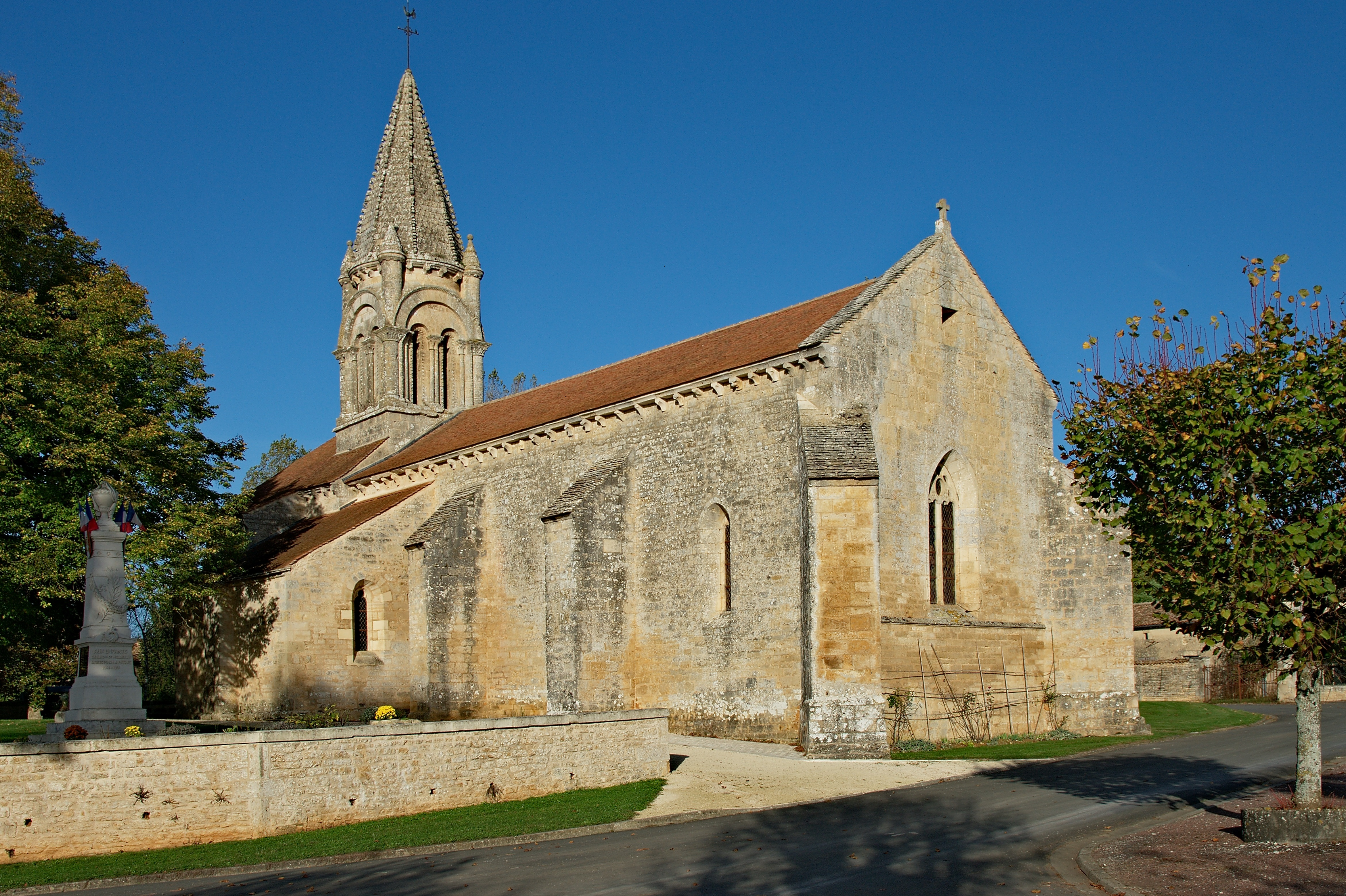 Église Notre-Dame de Melleran